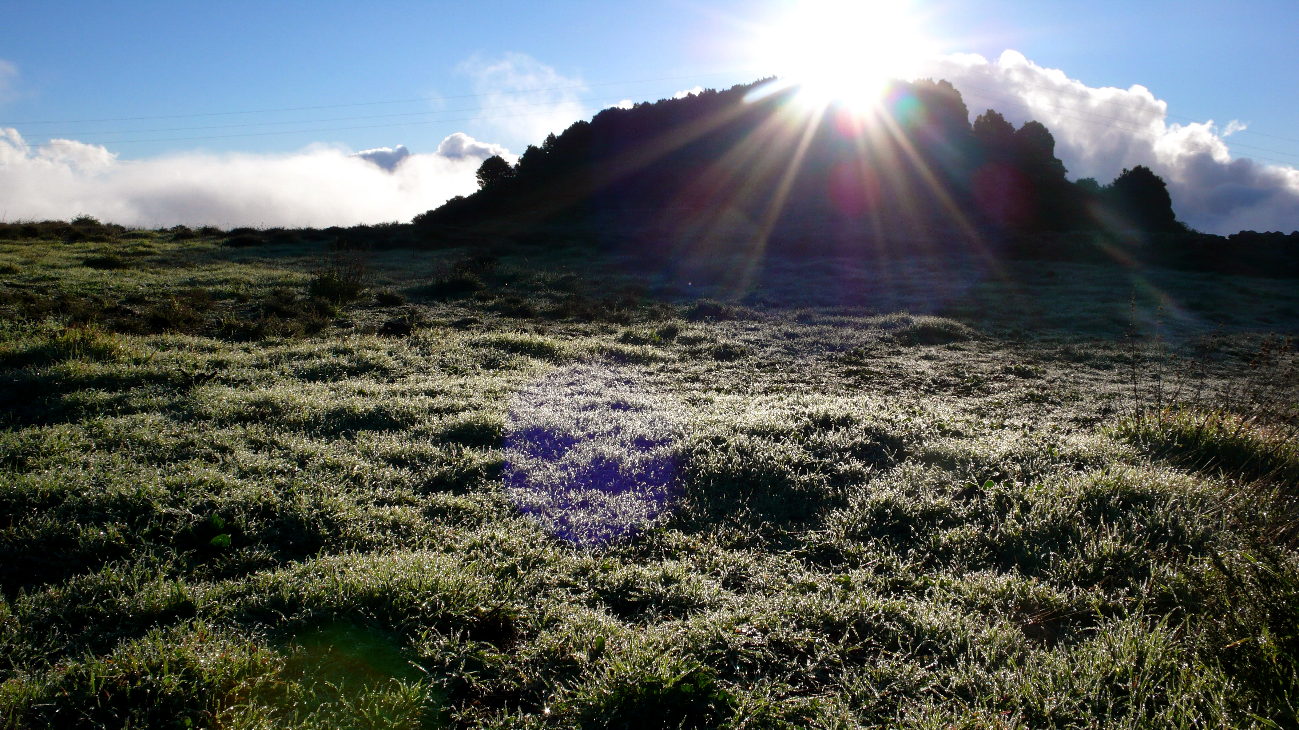 Paisaje cercano a Isora (El Hierro)